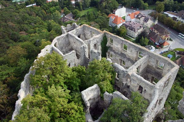 Beschreibung: Blick vom 25m hohen Bergfried auf die Burgruine Rauhenstein in Baden bei Wien Quelle: Fotografiert am 19.09.2004 Fotograf oder Zeichner: Peter Gerstbach Lizenzstatus: GNU Freie Dokumentationslizenz